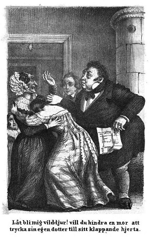 "Låt bli mig vilddjur!" Illustration from Berättelser af Onkel Adam by C.A. Wetterbergh